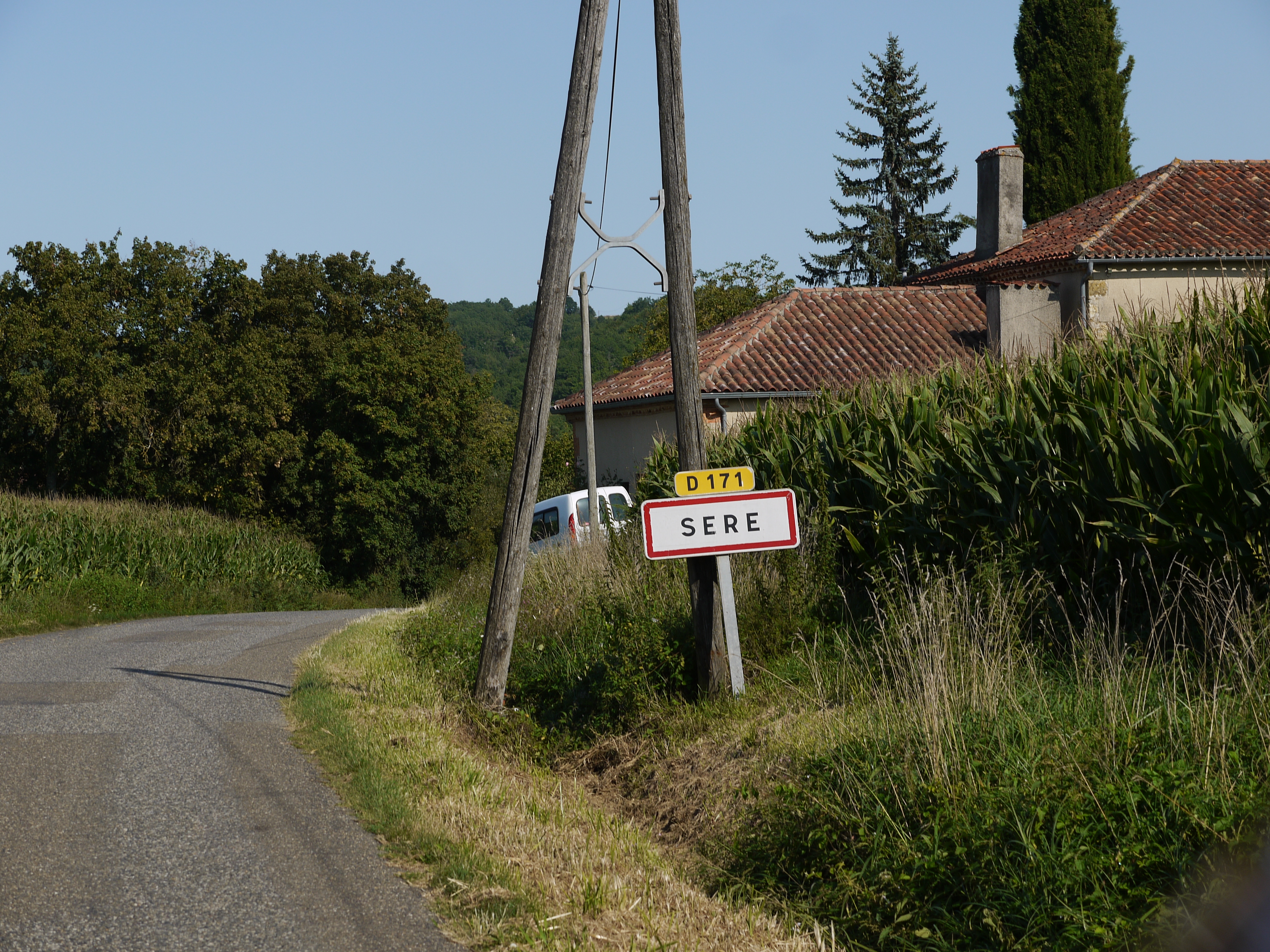 Entrée de Sère par la route D171